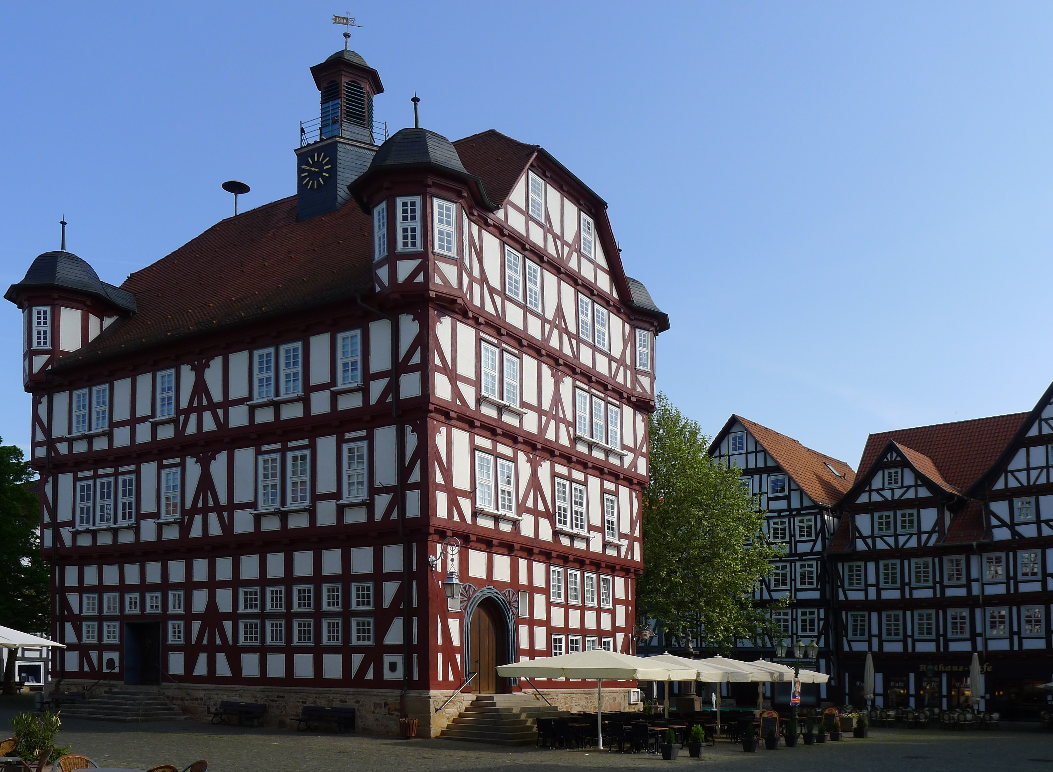 Rathaus auf dem Marktplatz